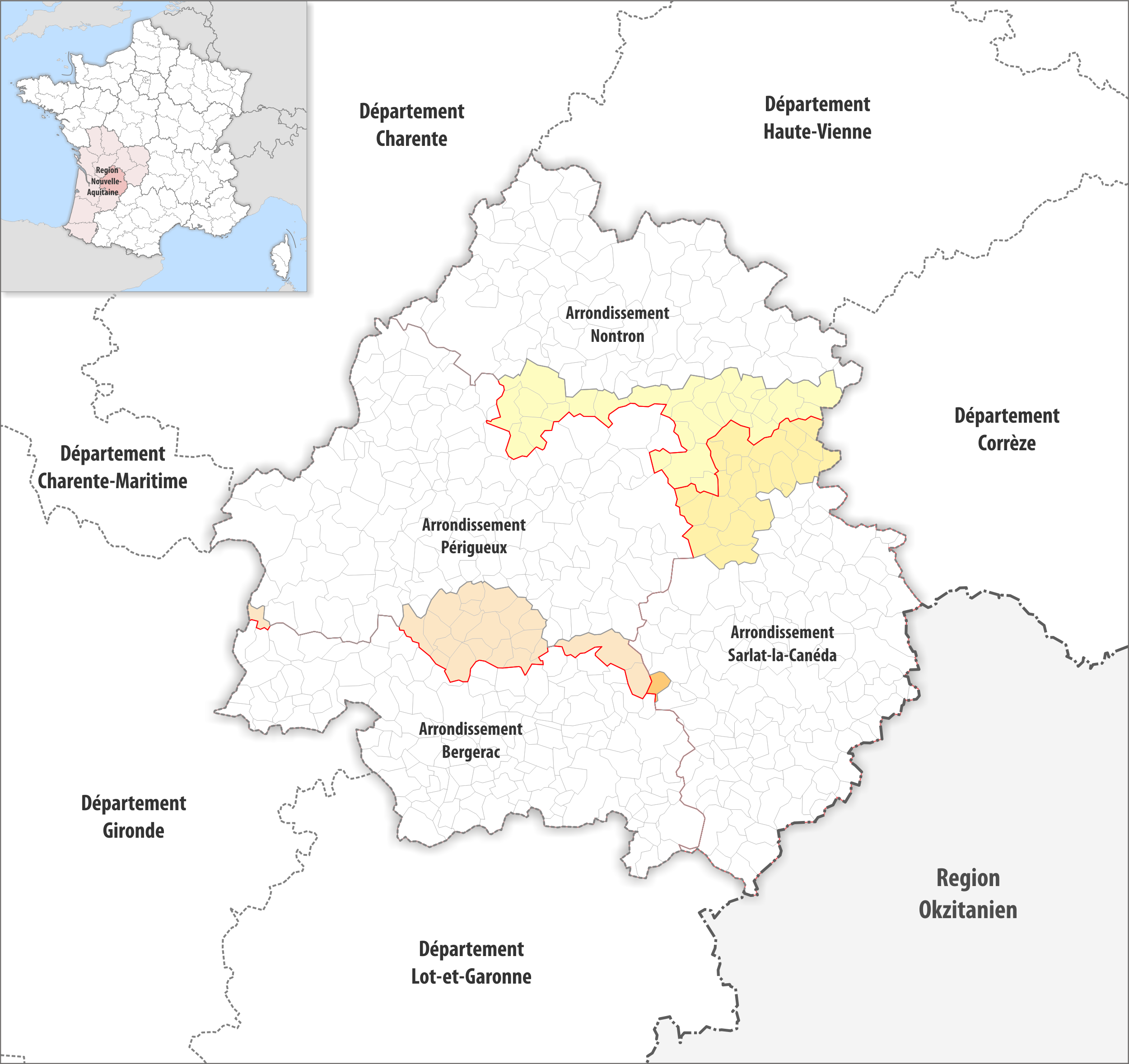 Arrondissements Anpassungen auf 2017 im Departement Dordogne